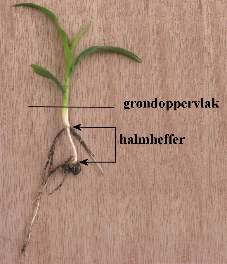 zelfgemaakte foto van kiemplant van mais